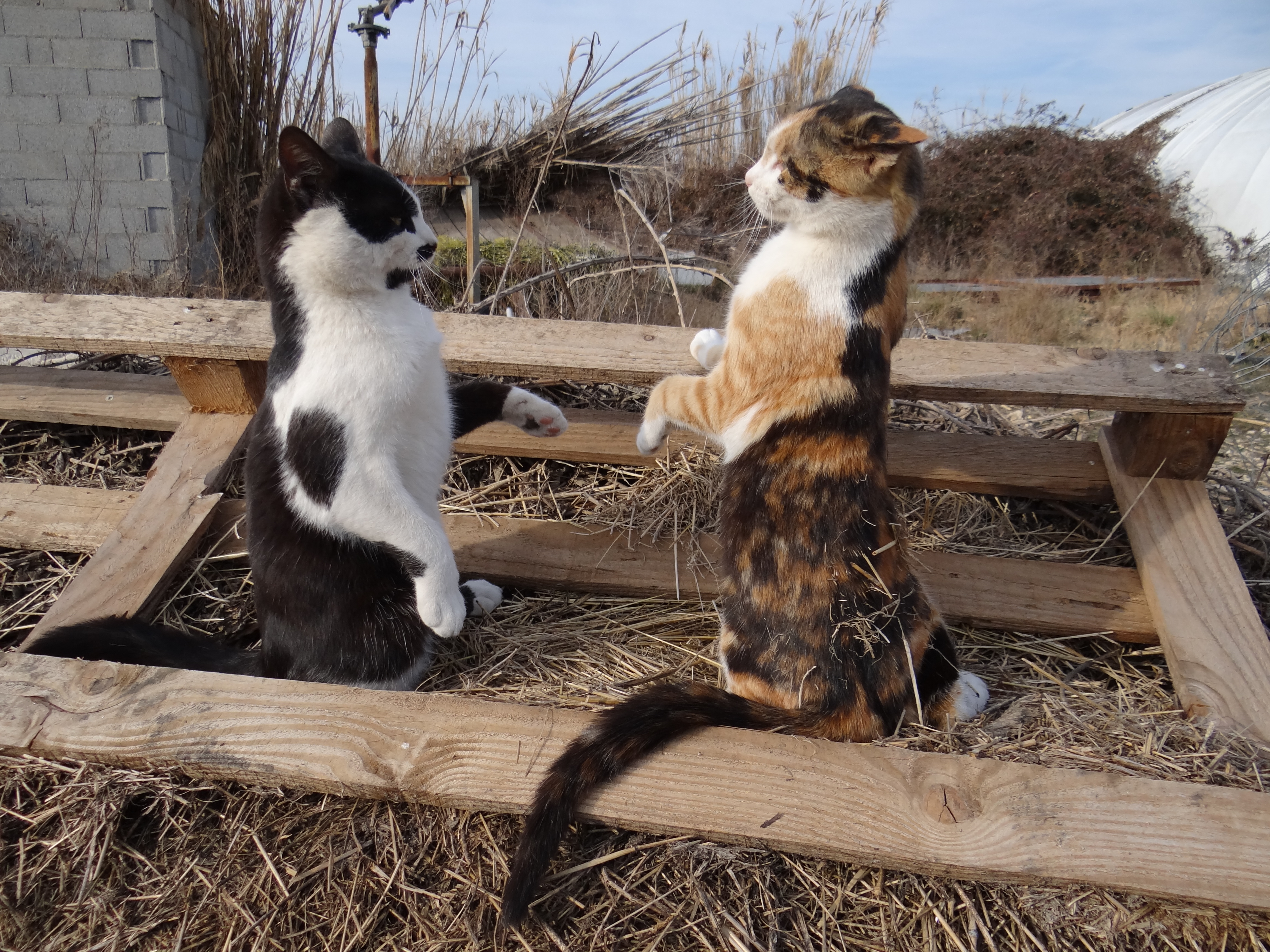 Combat de chats... pause